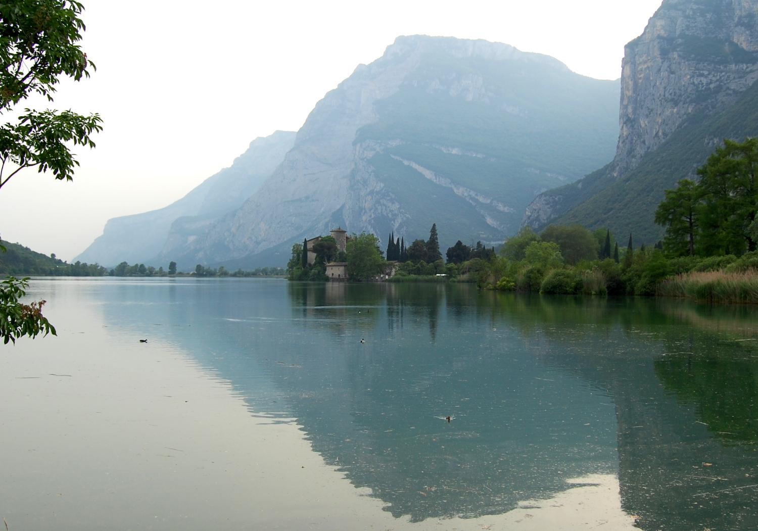 Blick vom Westufer des Tobliner See nach Süden.